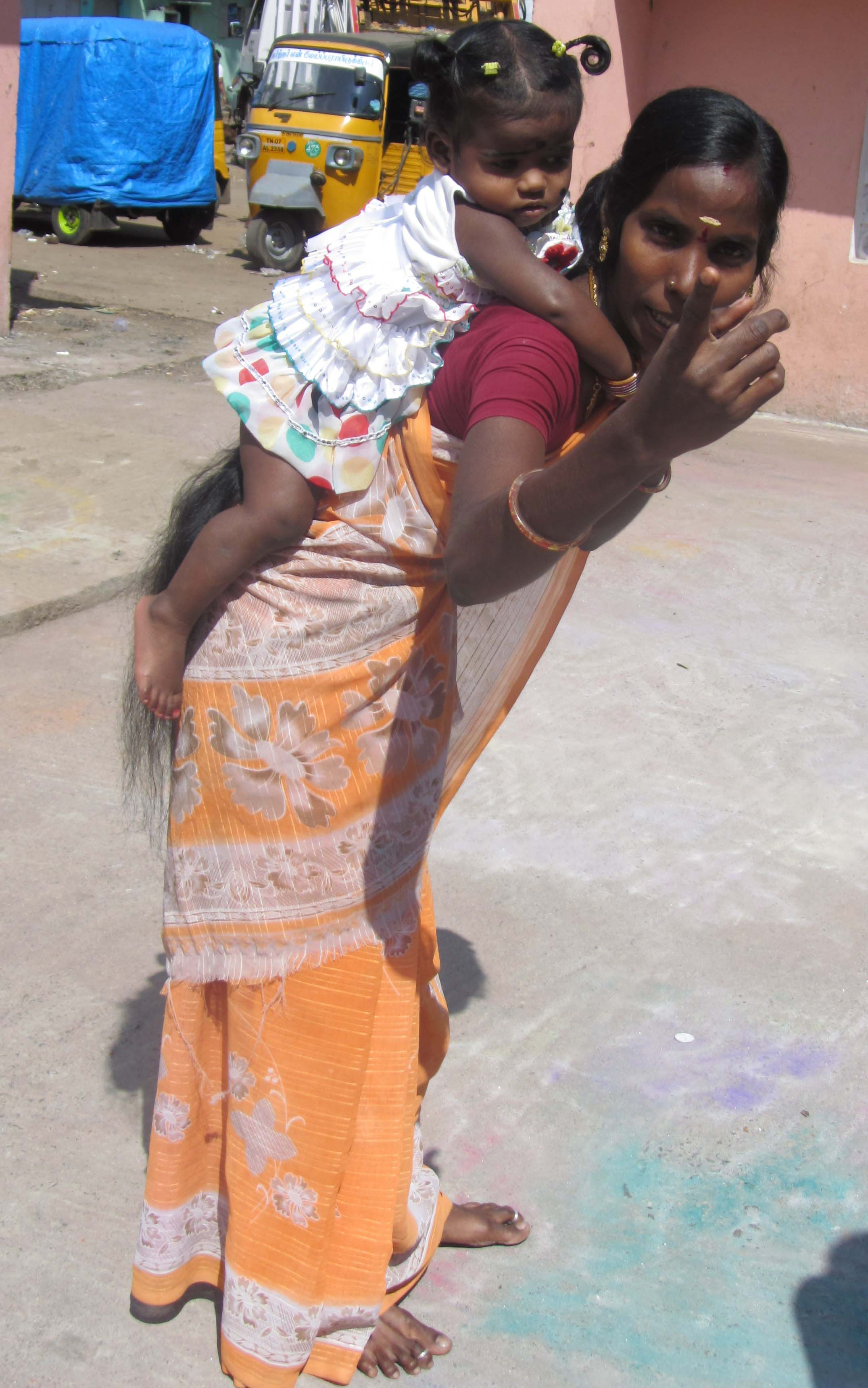 own shot - குழந்தையை முதுகில் தூக்கிக்கொண்டு நடந்து வேடிக்கை காட்டும் விளையாட்டு.